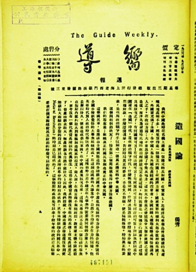 《向导》周报